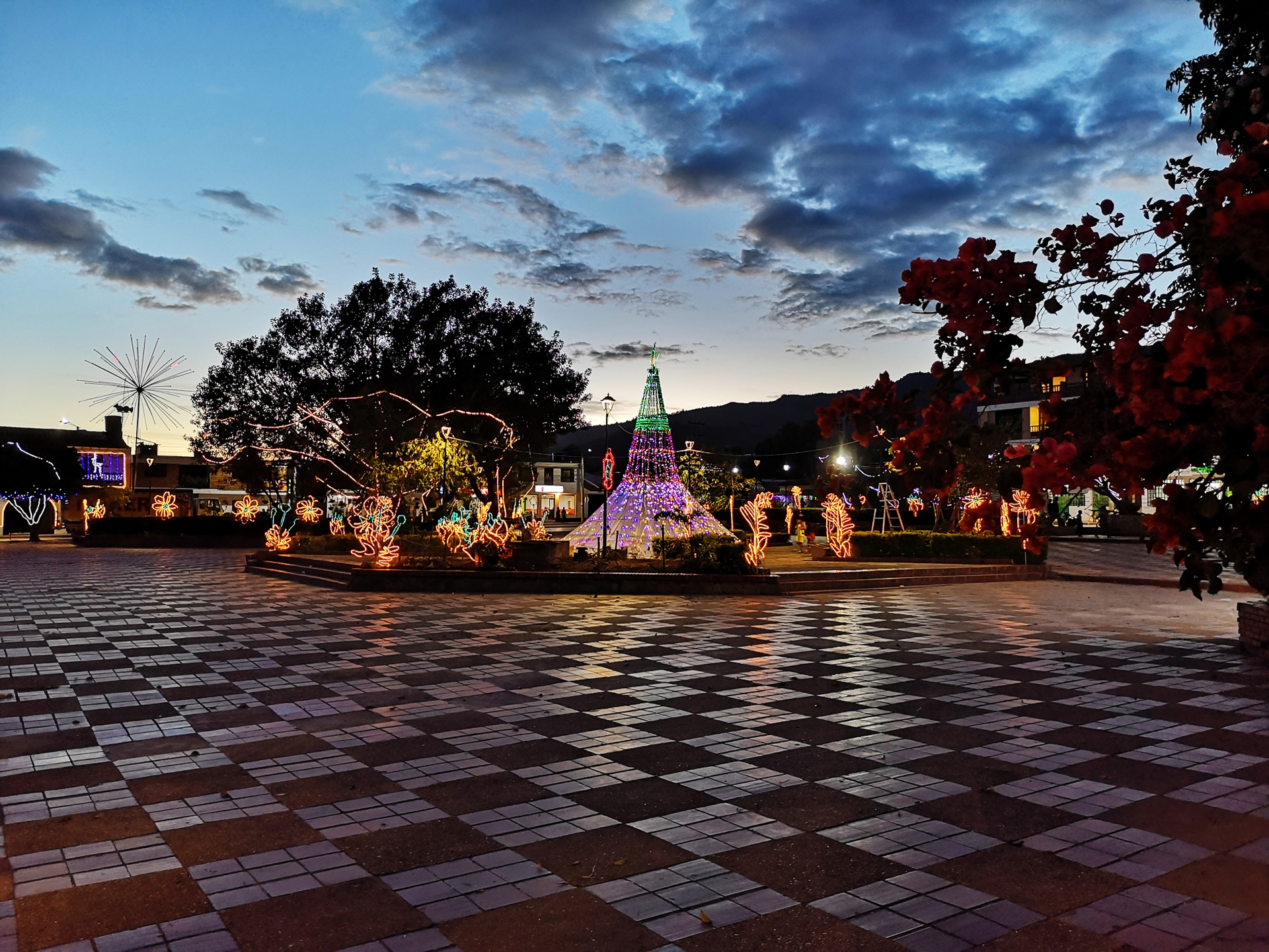 Atardecer en el municipio de Sutamarchán en el departamento de Boyacá - Colombia. Mezcla de cielo azul con notas de fuego, vegetación y un toque de la magia navideña que se vive en el municipio. Esta fotografía fue tomada en el municipio colombiano con código 15776.